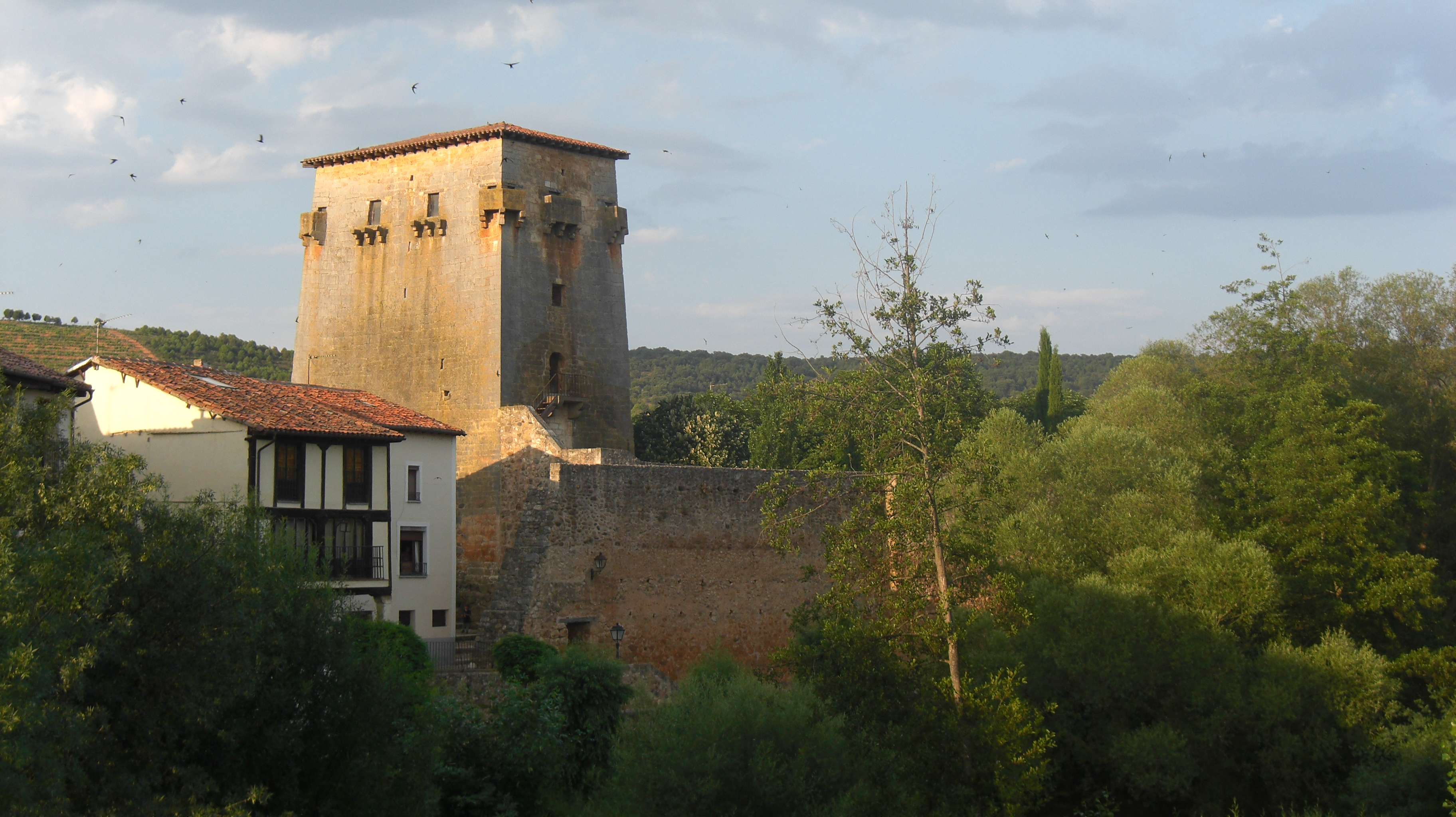 Torre defensiva del siglo X en Covarrubias (Burgos) que enlaza con la muralla que rodeaba la población.